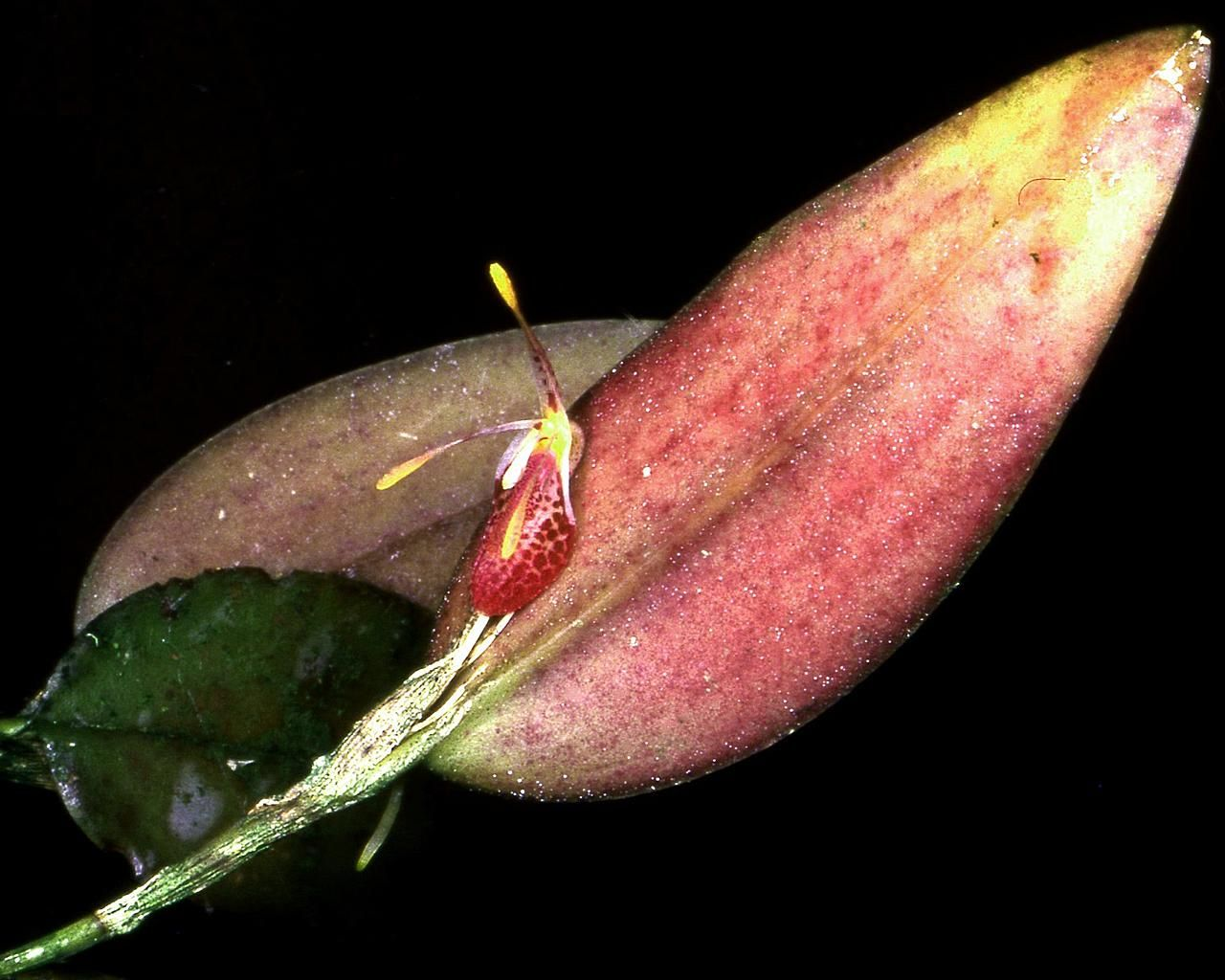 Restrepia muscifera - part of plant